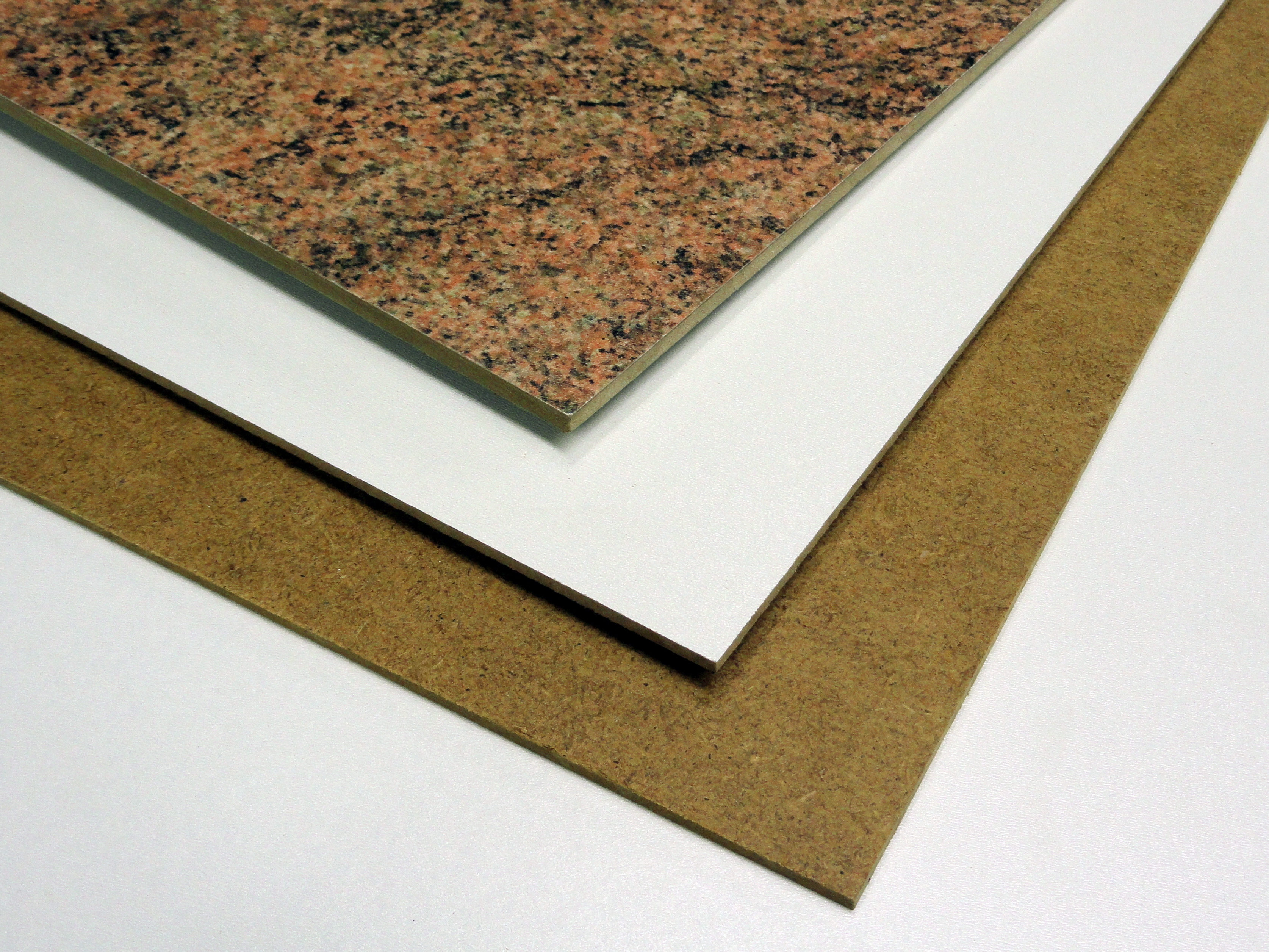 Fibreboard